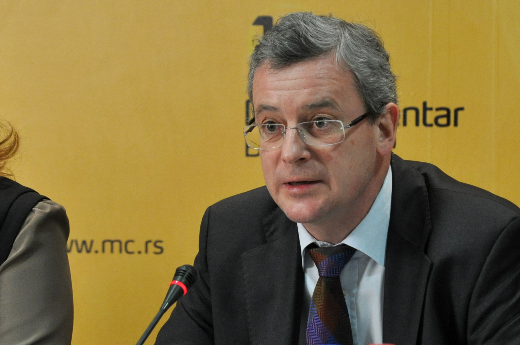 Јоханес Ајгнер аустријски дипломата